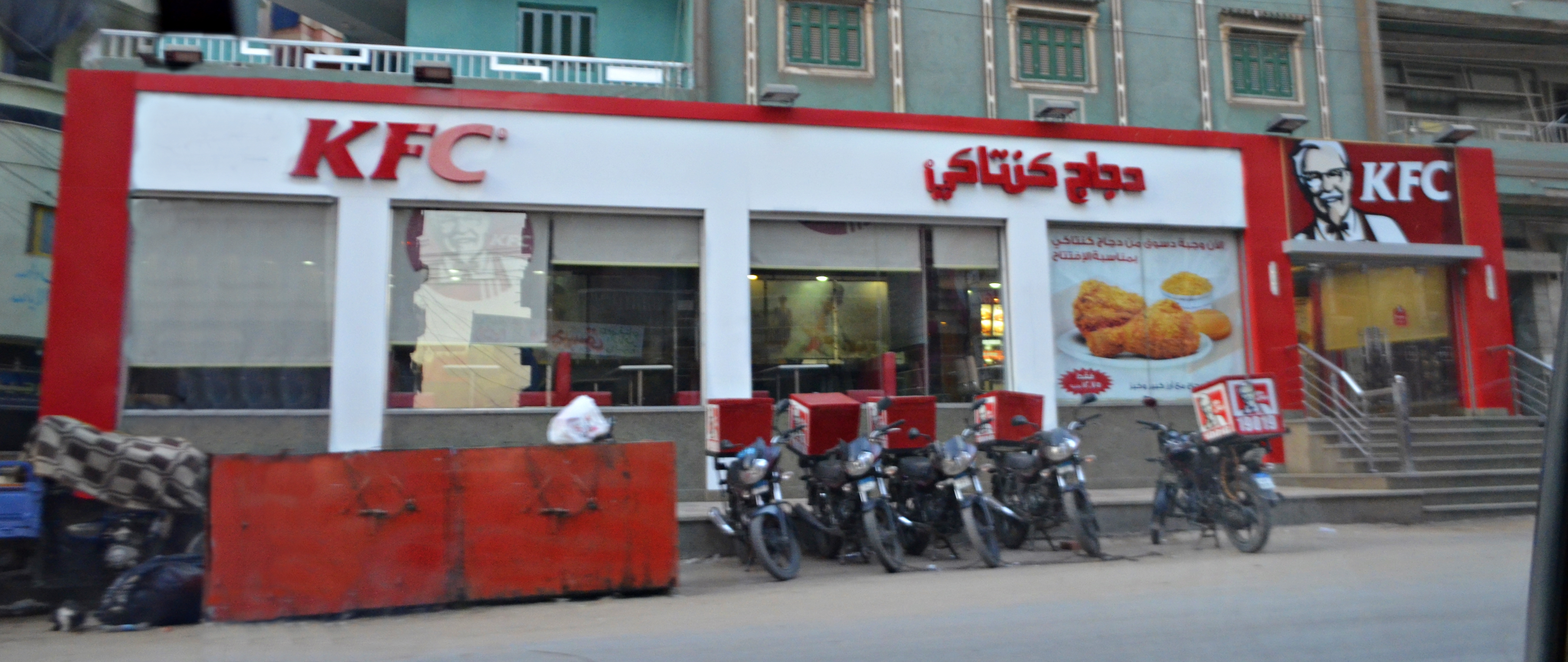 دجاج كنتاكي، دسوق